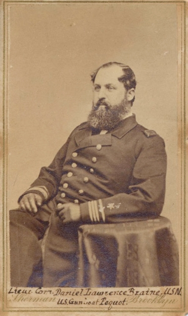 Lieutenant Commander Daniel Lawrence Braine, c.1862